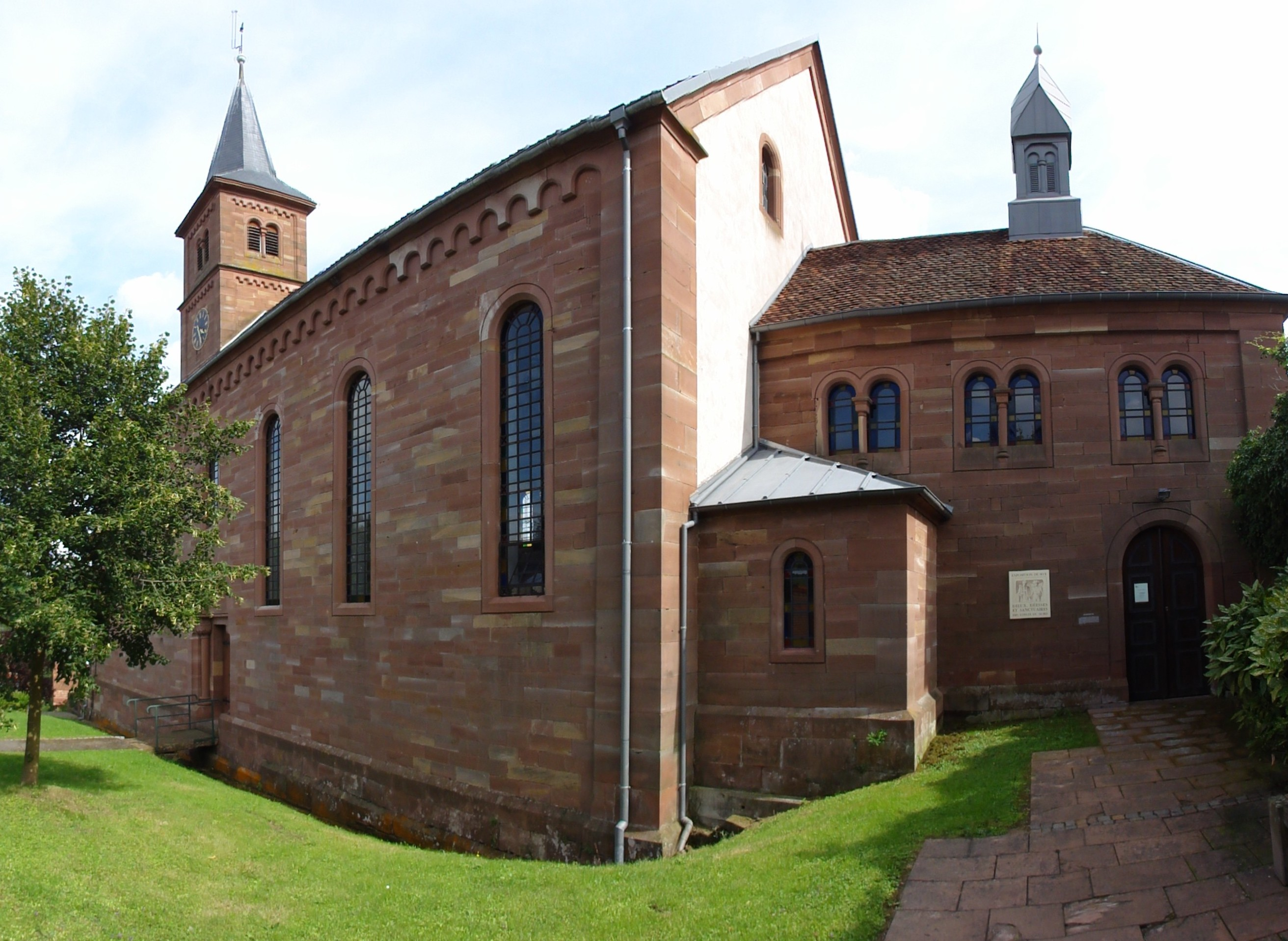 Alsace, Bas-Rhin, Église protestante de Langensoultzbach (IA67008446). (photo panoramique)